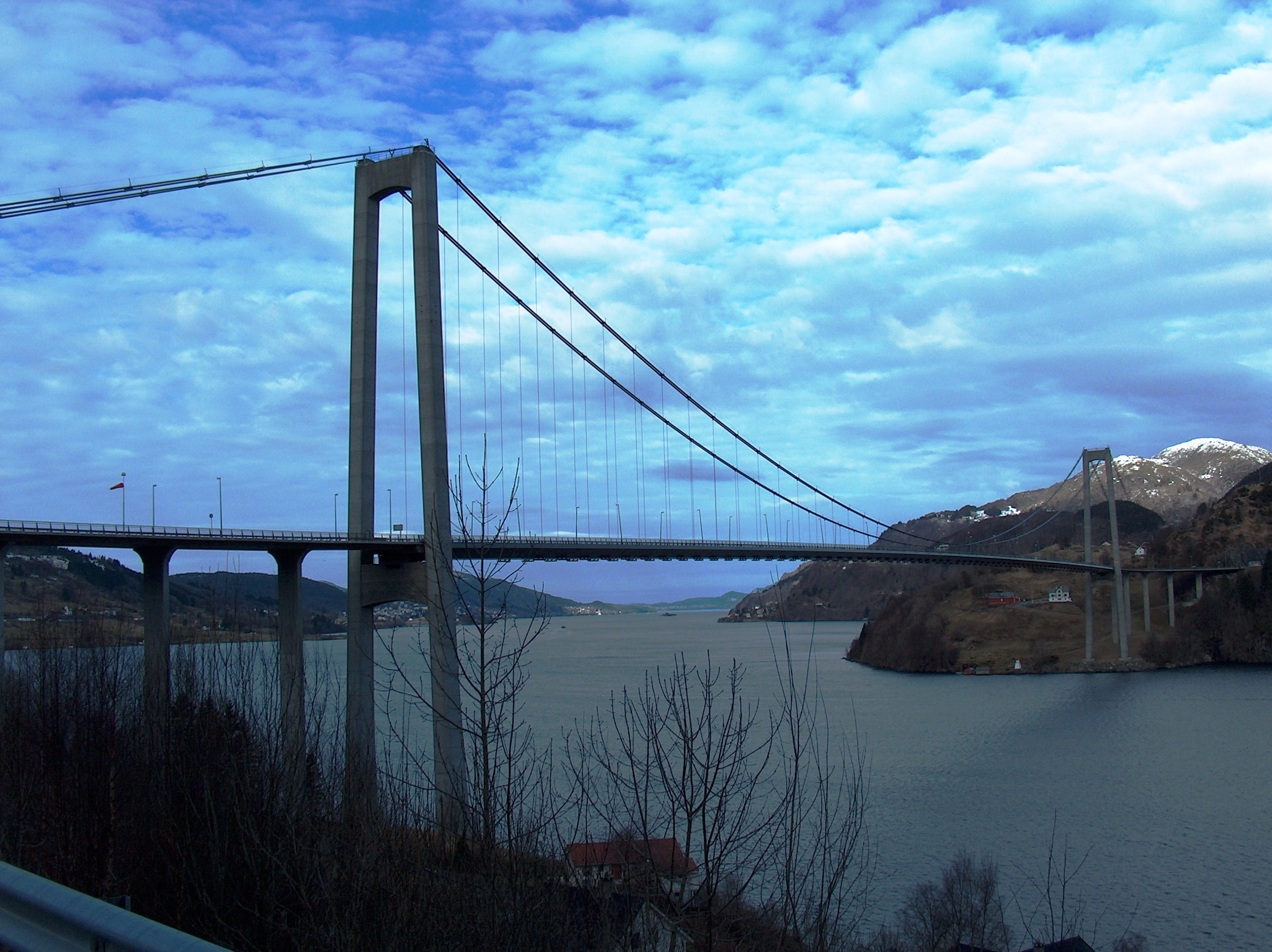 Osterøybroen